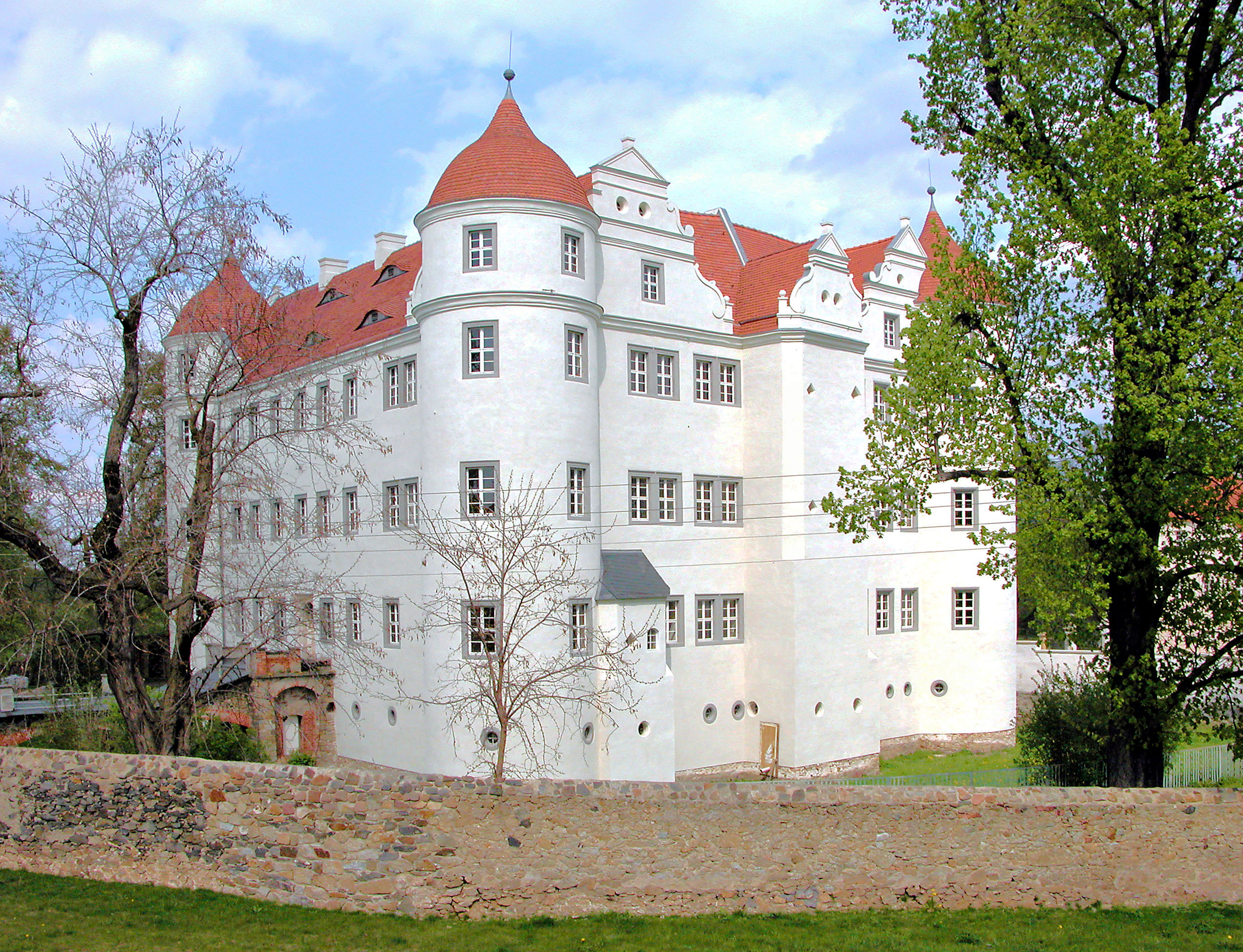 01.05.2006 01990 Großkmehlen, Dr.-Z.-von-Lingenthal-Straße (GMP: 51.379743,13.724841): Wasserschloß aus der Renaissance (16. Jh), soeben saniert. Sicht von Südwesten. [DSCN9753.TIF]20060501310DR.JPG(c)Blobelt